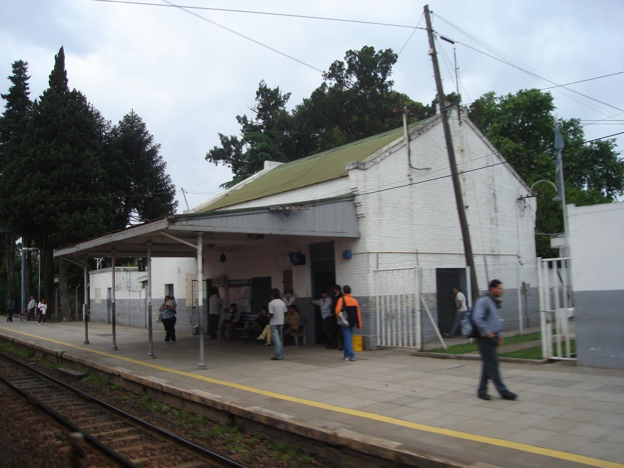 Vista del edificio principal de la estación Don Torcuato del Ferrocarril General Belgrano. Don Torcuato, partido de Tigre, provincia de Buenos Aires, República Argentina.